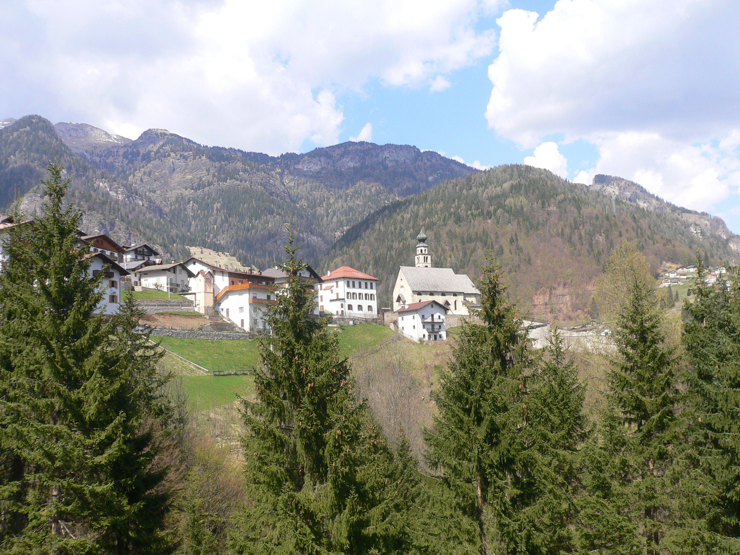 San Tomaso Agordino (Celat: la sede municipale)